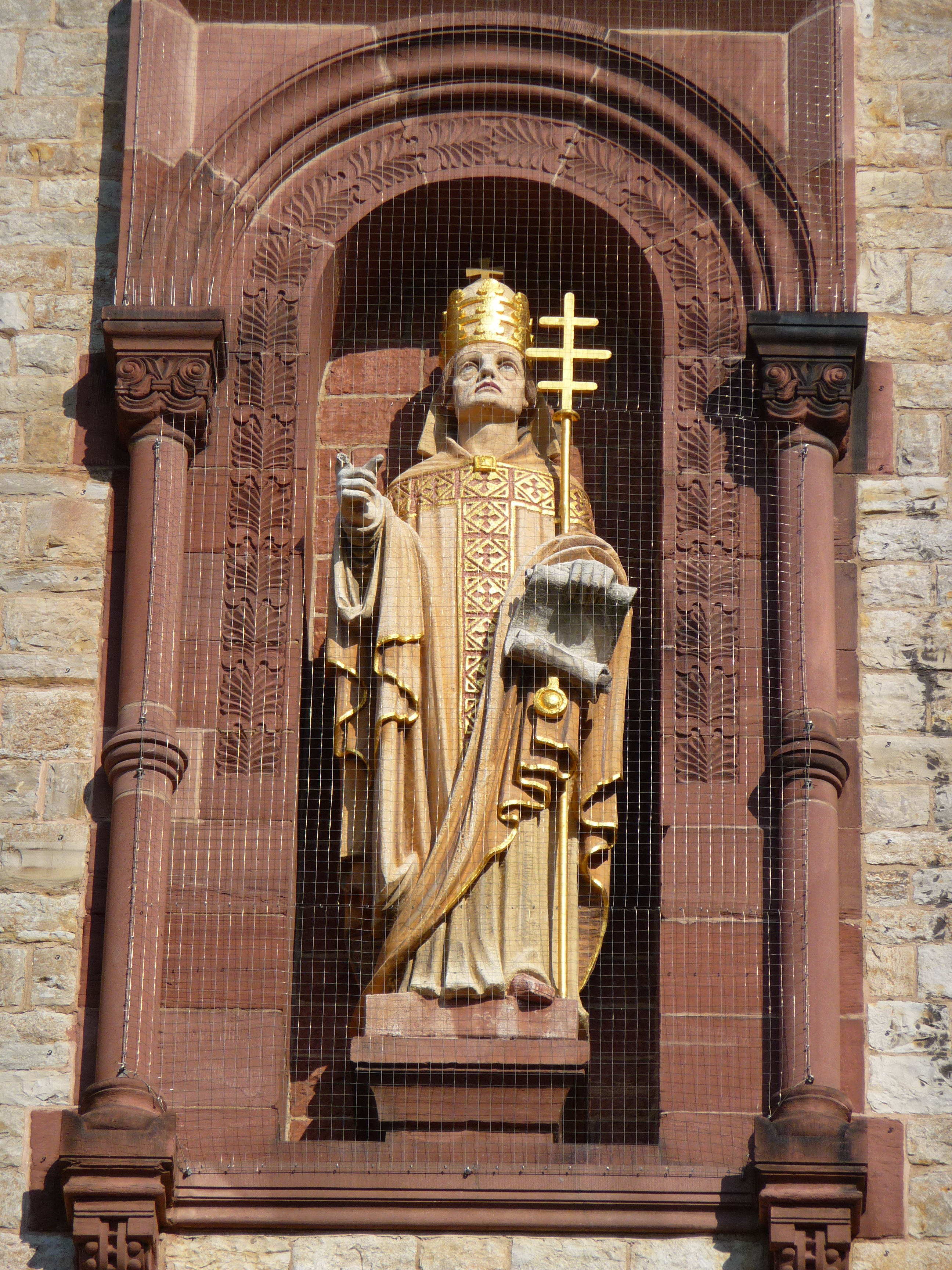 St. Bonifatius in der Heidelberger Weststadt (Baden-Württemberg, Deutschland); Darstellung von Papst Gregor II. am rechten Turm des Hauptportals